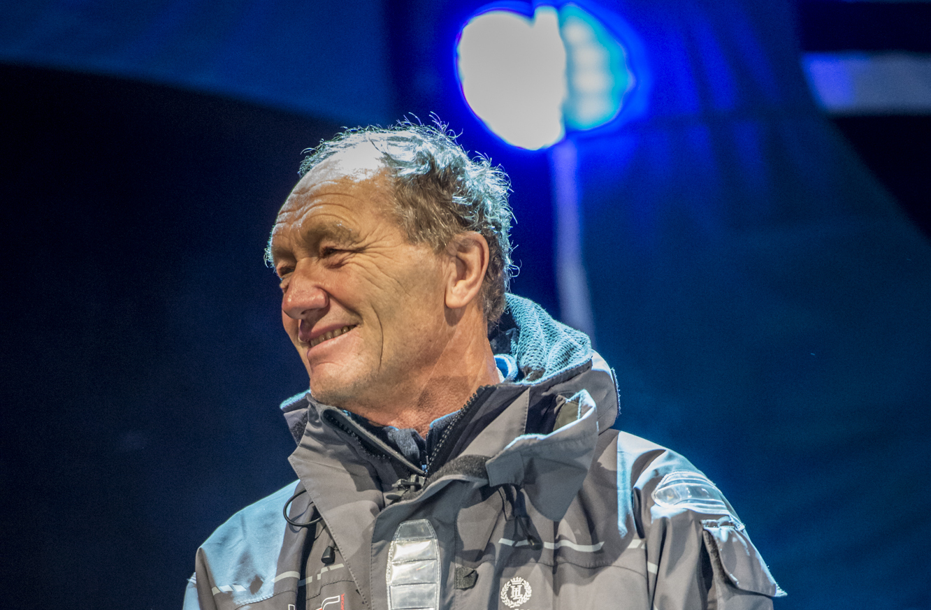 Francis Joyon quelques jours avant le départ de la Route du Rhum 2014.